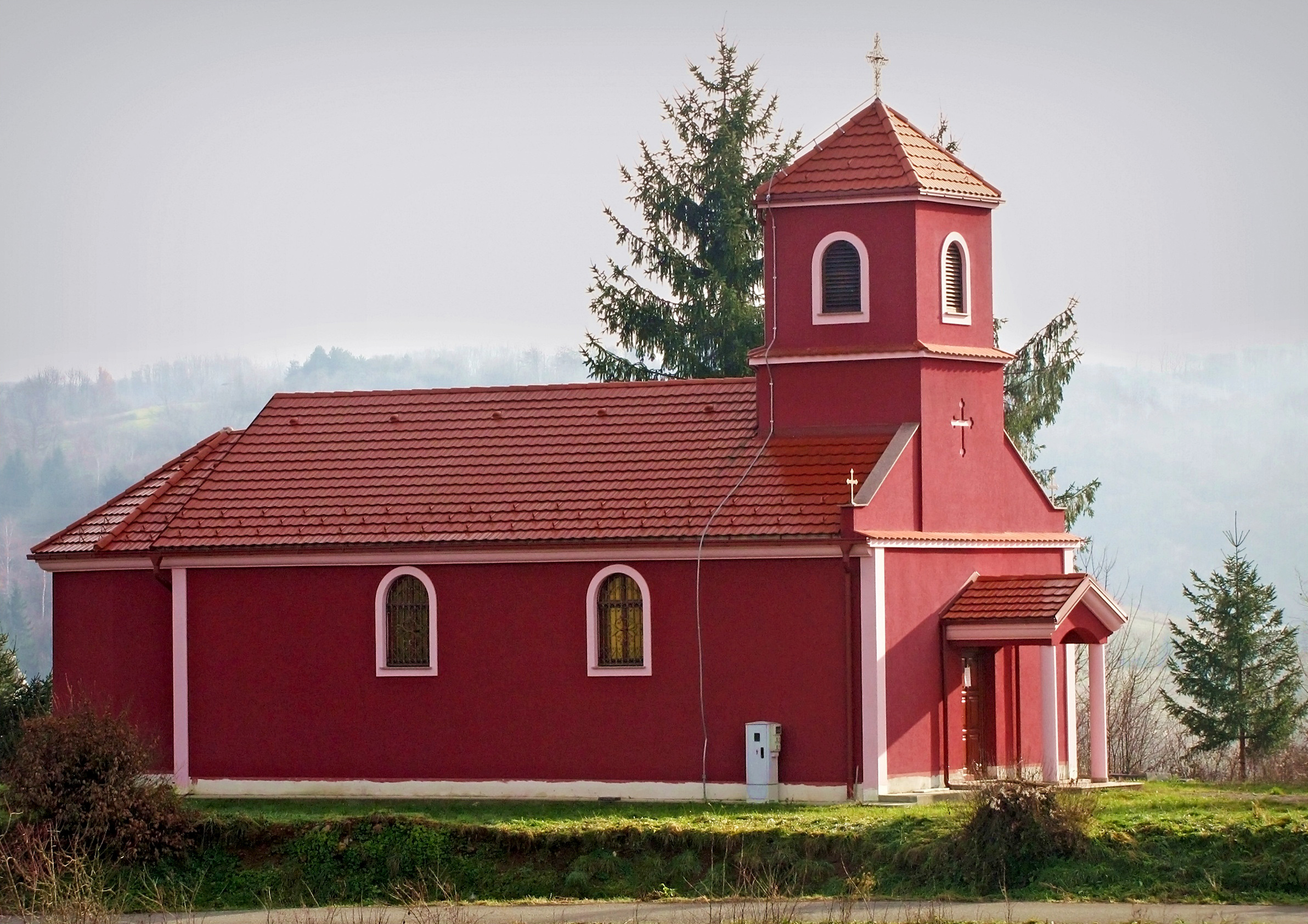 Храм Светих Апостола Петра и Павла